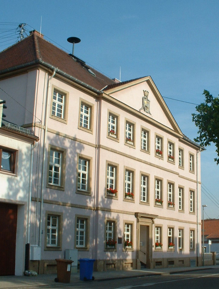 Maudach castle in Ludwigshafen